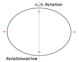 Rotationsellipsoid und Massenverlagerung Zeichnung Nepheteser 2004 geringe Schöpfungshöhe